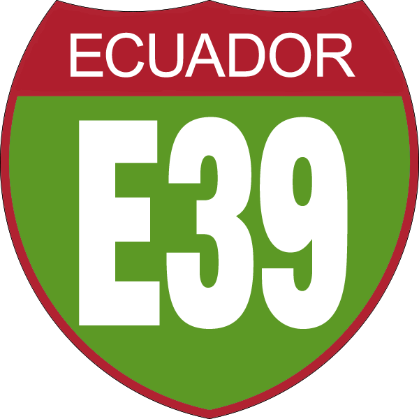 Disco de Identificación Vía Colectora E39